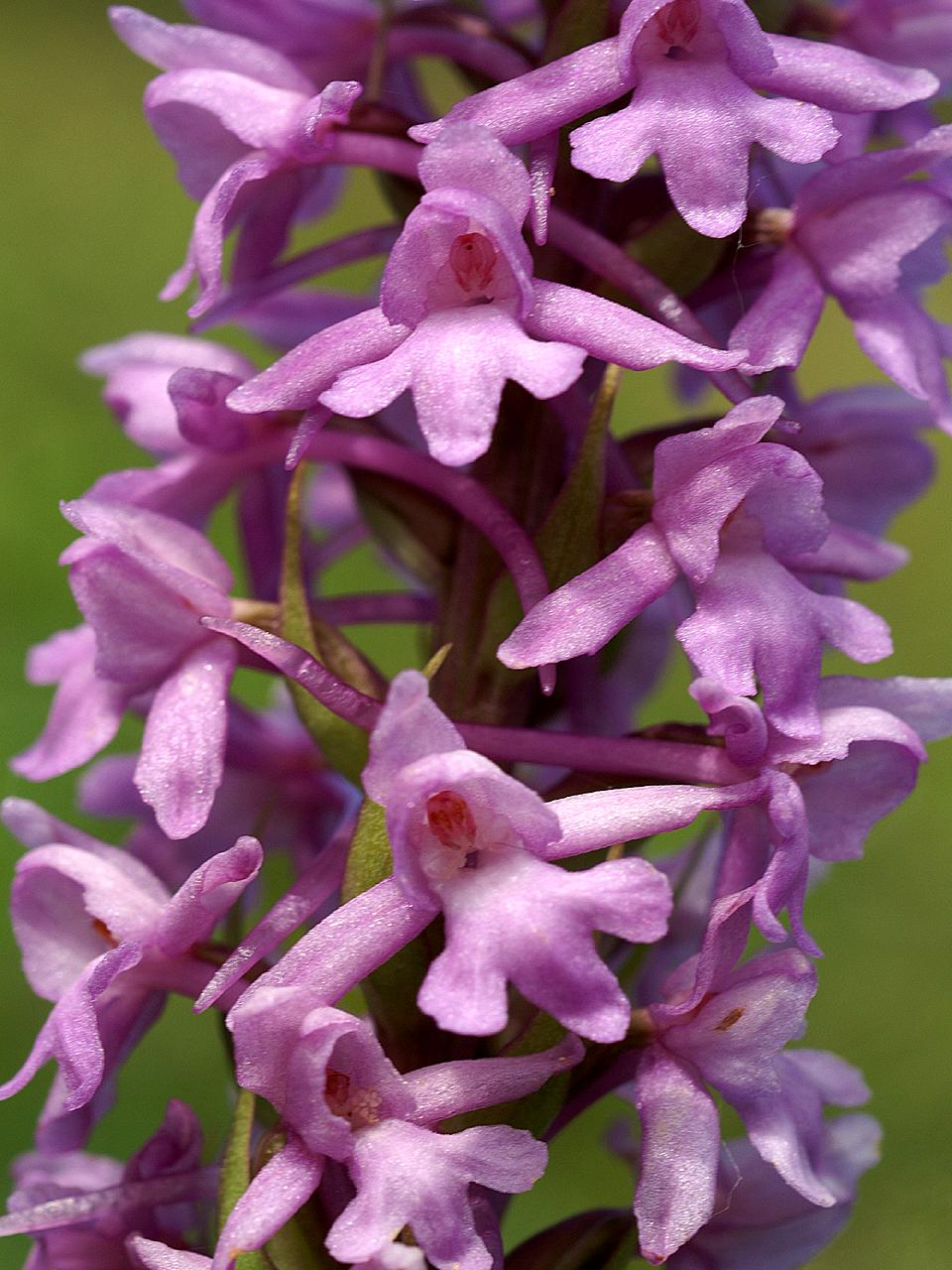 Gymnadenia conopsea